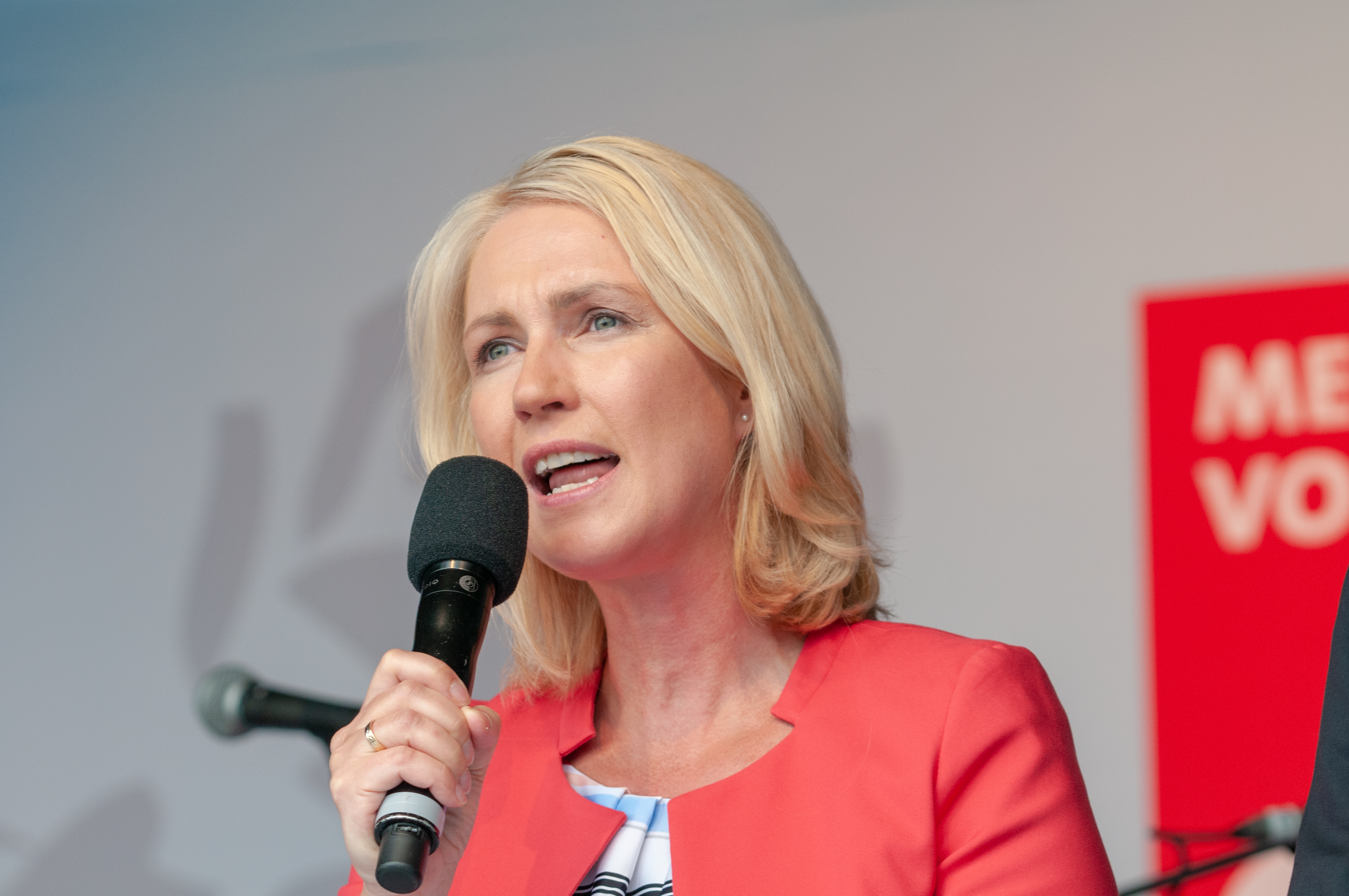 Wahlkampf Veranstaltung der SPD Mecklenburg-Vorpommern zur Landtagswahl in Mecklenburg-Vorpommern 2016 in Rostock.